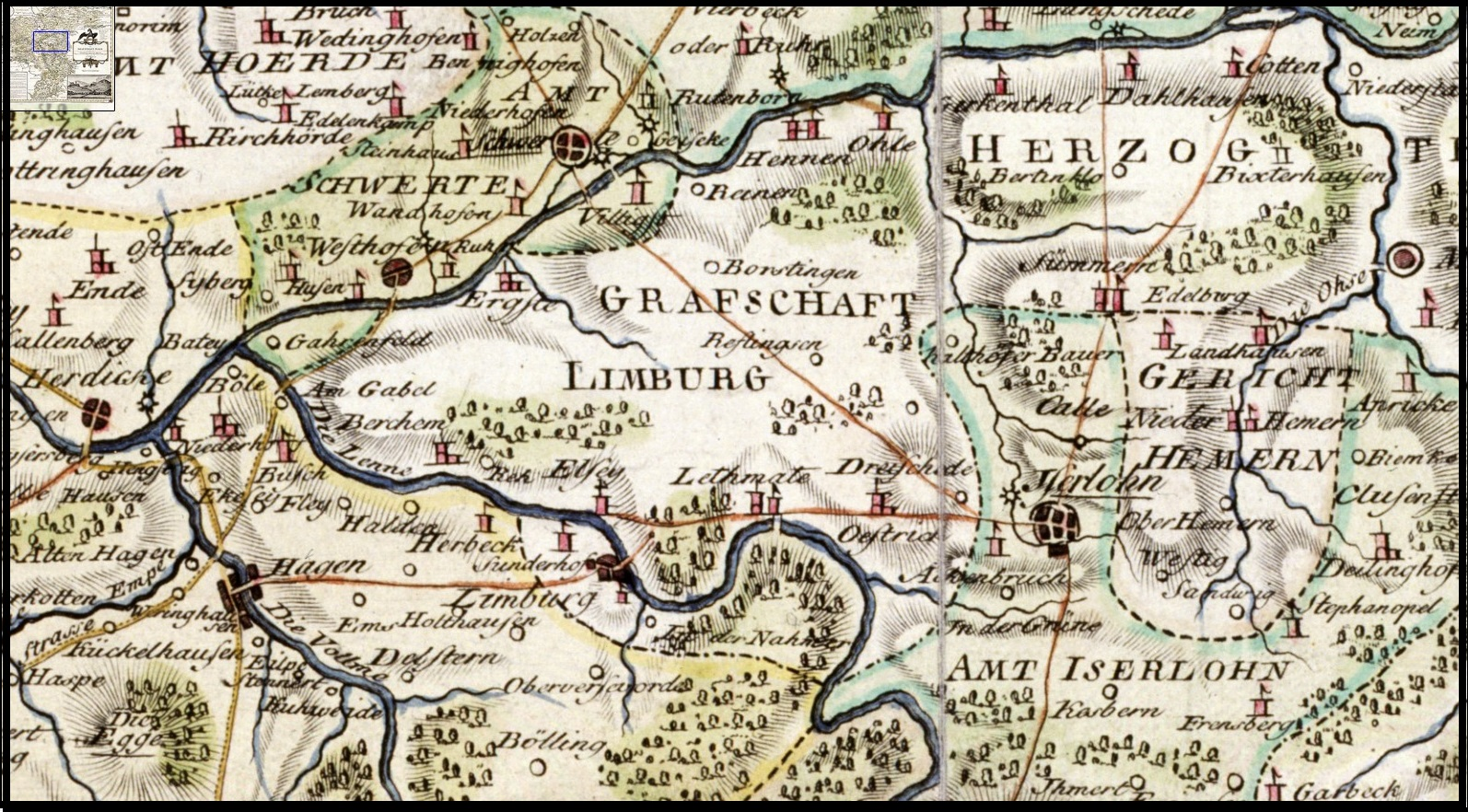 Kaartfragment uit kaart Mark. Friederich Christopher Muller. Herausgabe P.F. Weddingen 1791.